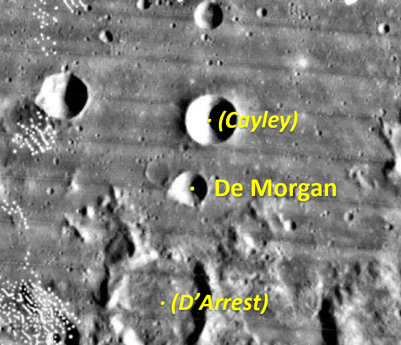 Imagen del cráter De Morgan, situado entre los cráteres D'Arrest (al sur) y Cayley (al norte)